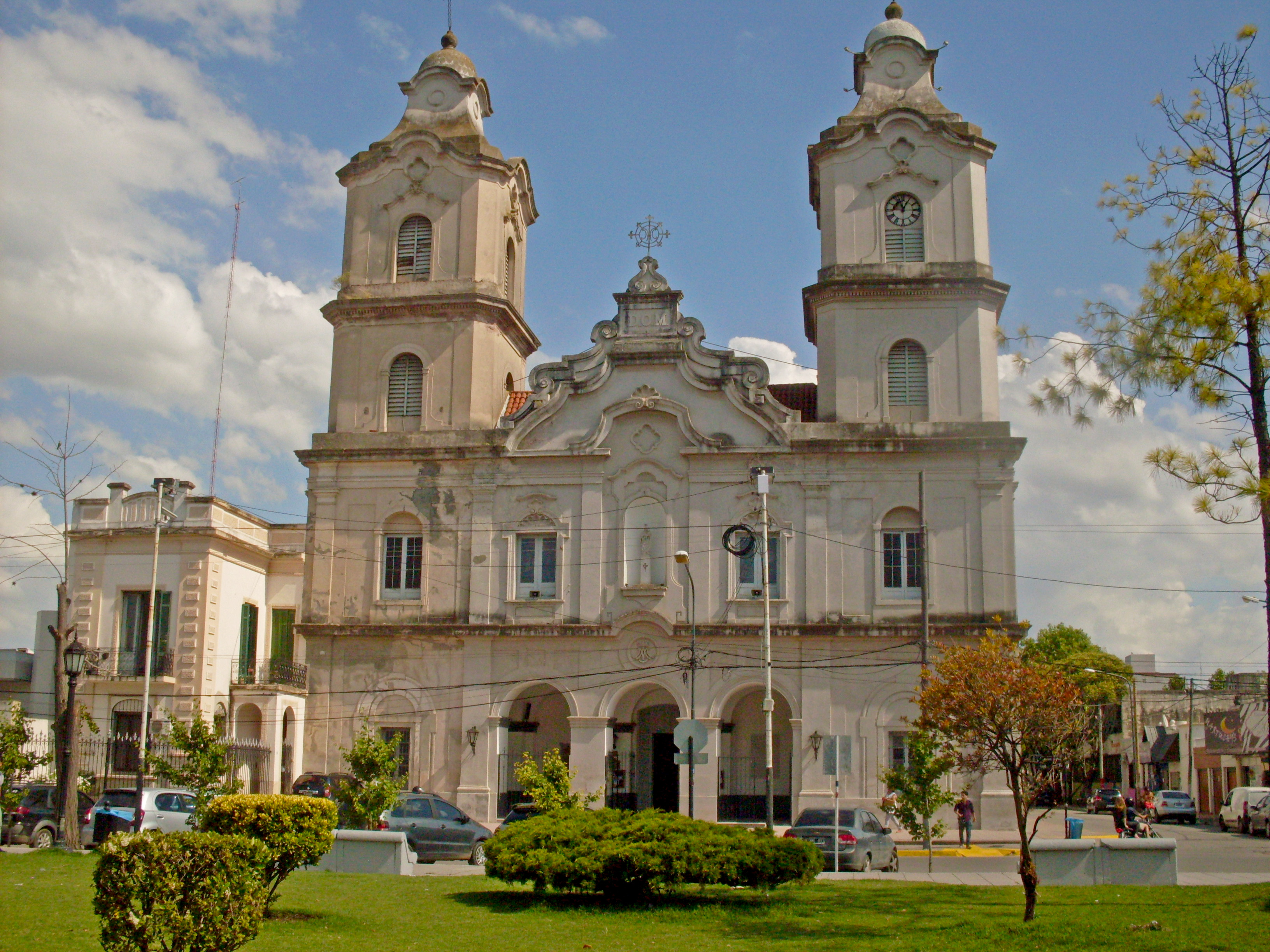 Parroquia Nuestra Señora del Pilar, Pilar, Buenos Aires. Argentina.